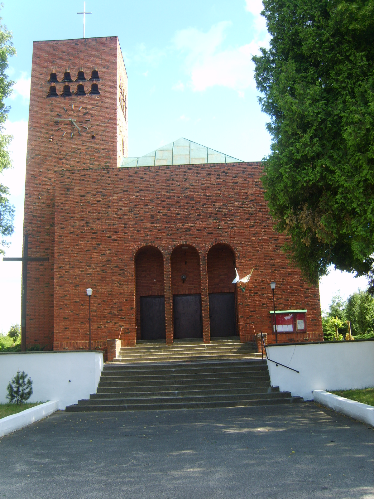 Kościół w Lipce.